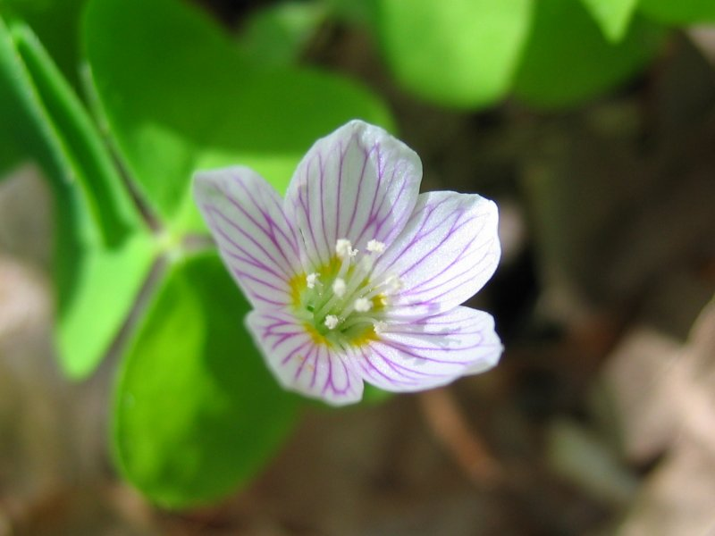 Blüte des Wald-Sauerklees Oxalis acetosella